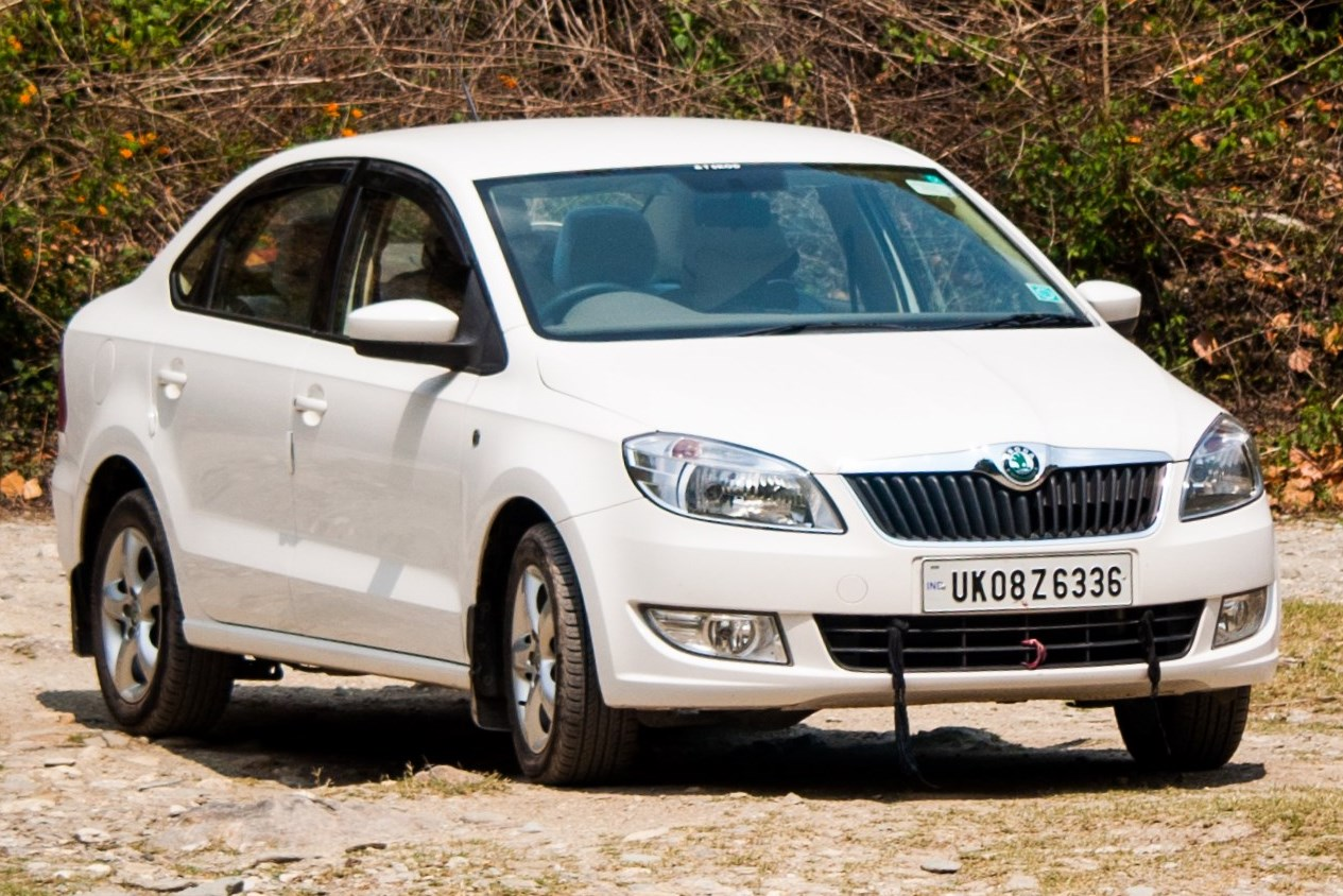 A Skoda Rapid in Uttaranchal, India.